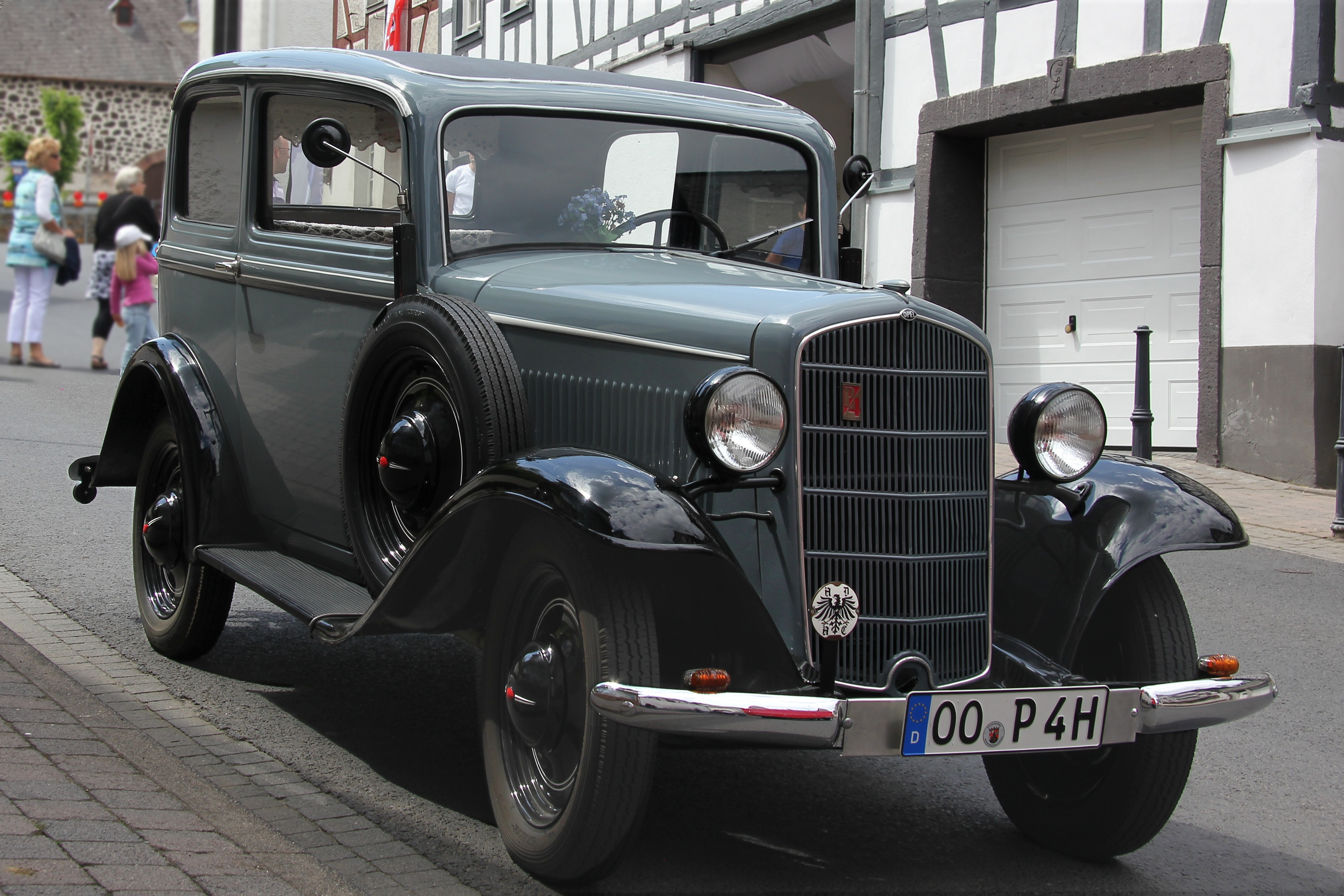 Opel P4, Baujahr 1936 (Phantasiekennzeichen)